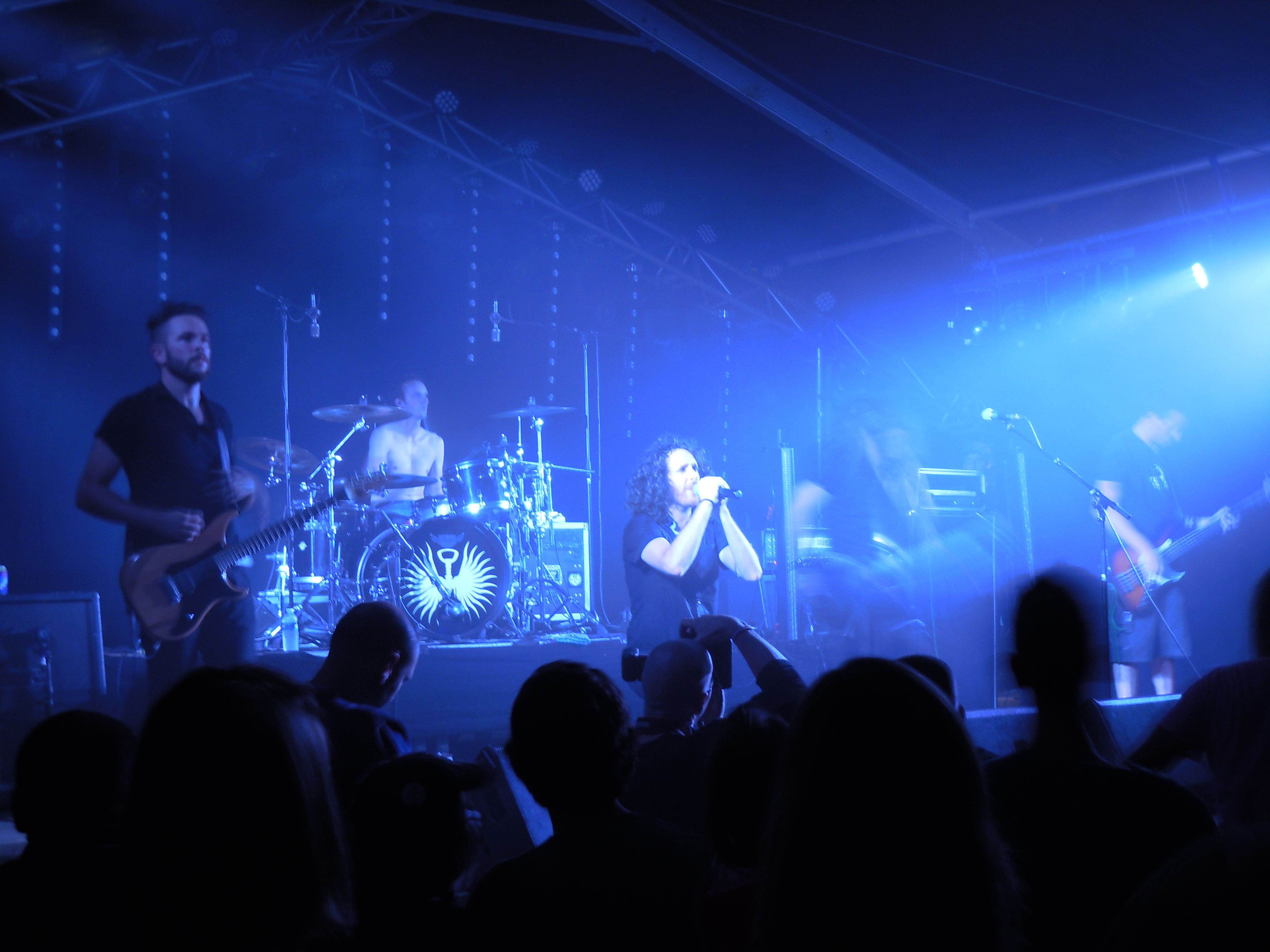 Le groupe Sidilarsen en concert au Donkey Rock Festival à Sélange (Belgique)